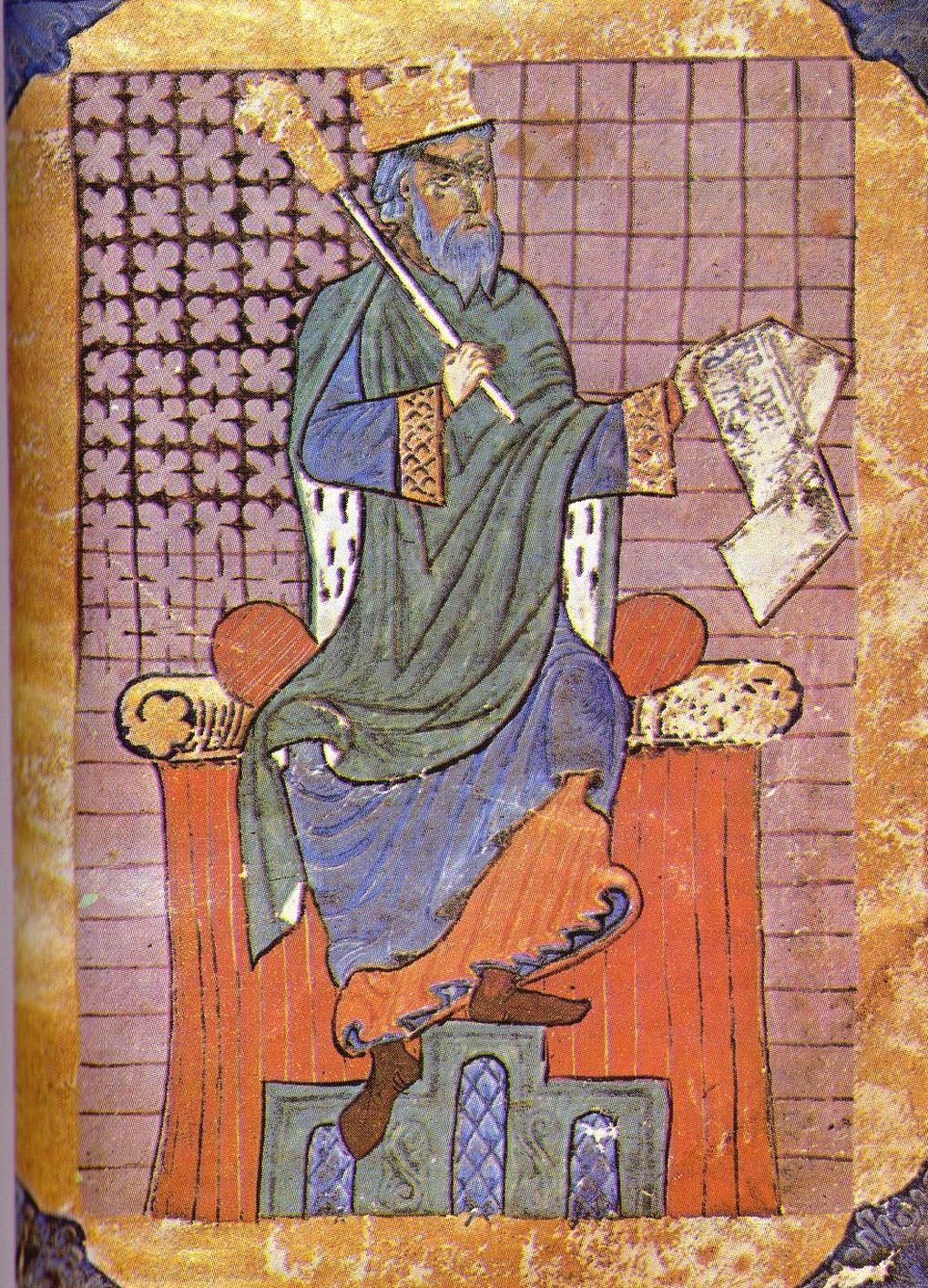 Fernando I, rei consorte de Galiza (1037-1065), no Tombo A da catedral de Santiago de Compostela.